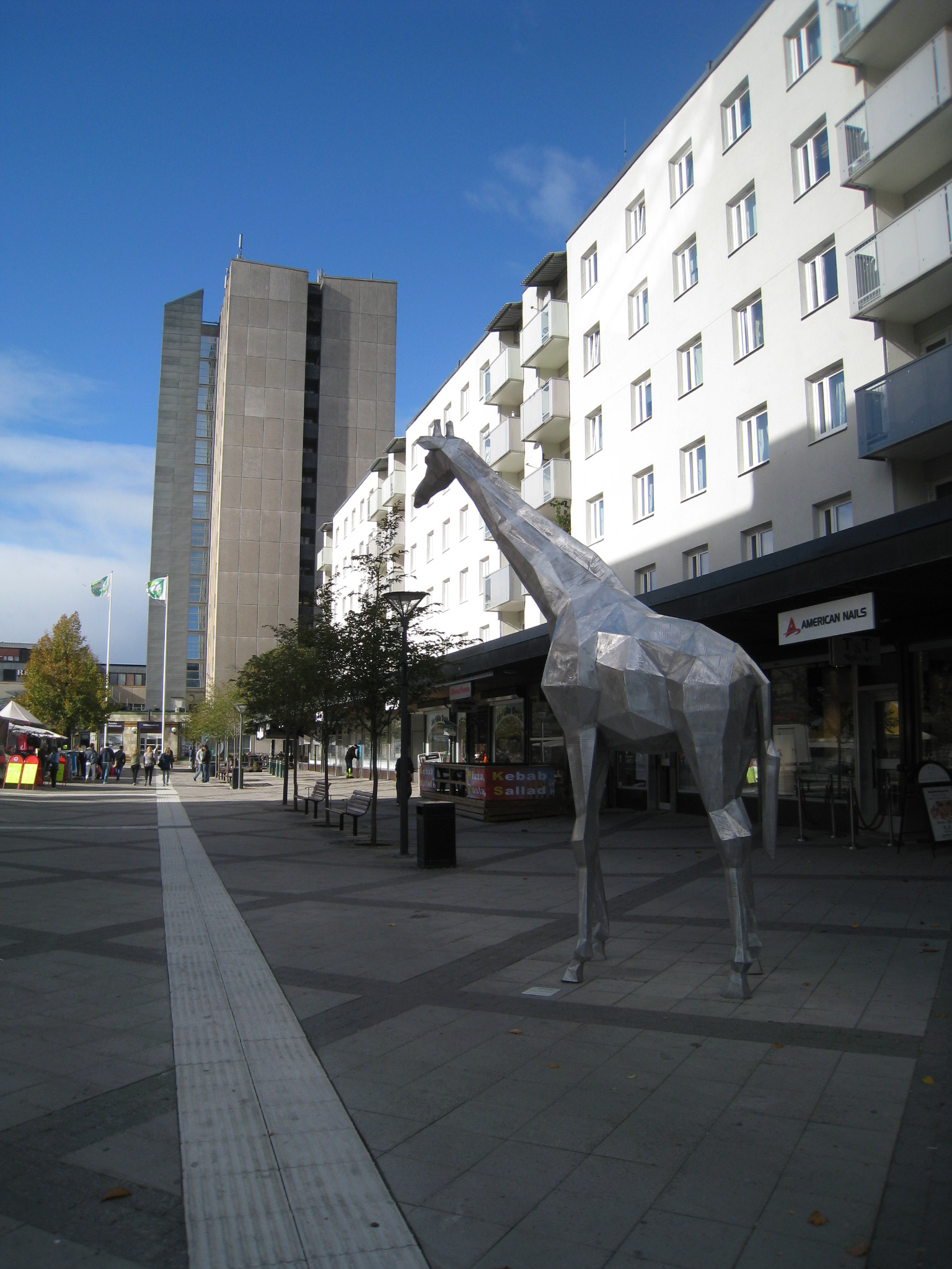 Jakobsberg Centrum i Järfälla kommun, Stockholms län. Riddarplatsen med skulpturen Giraffen av Thomas Karlsson.